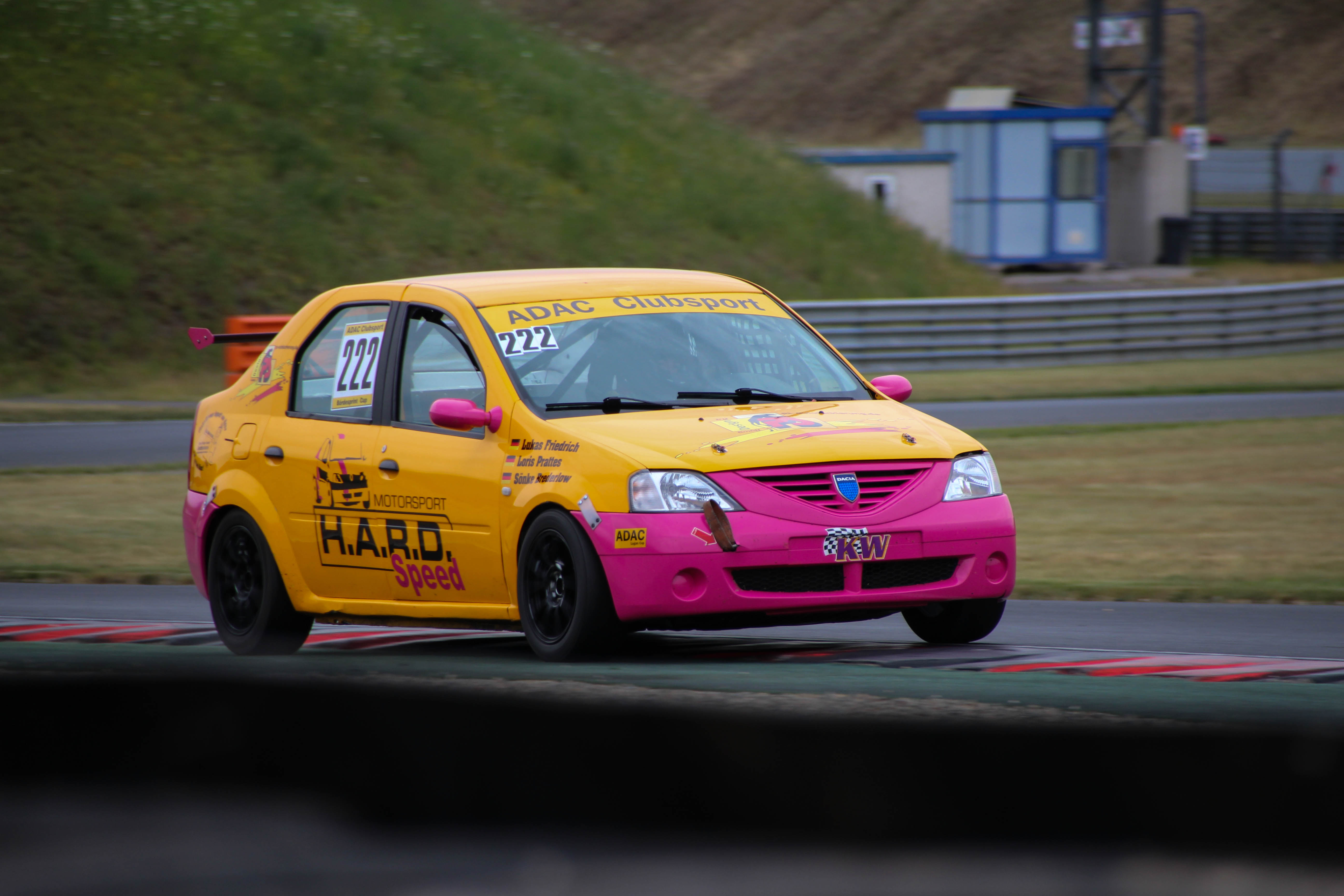 Ein Rennwagen von HARD Speed Motorsport aus dem ADAC Logan Cup in der Saison 2016.